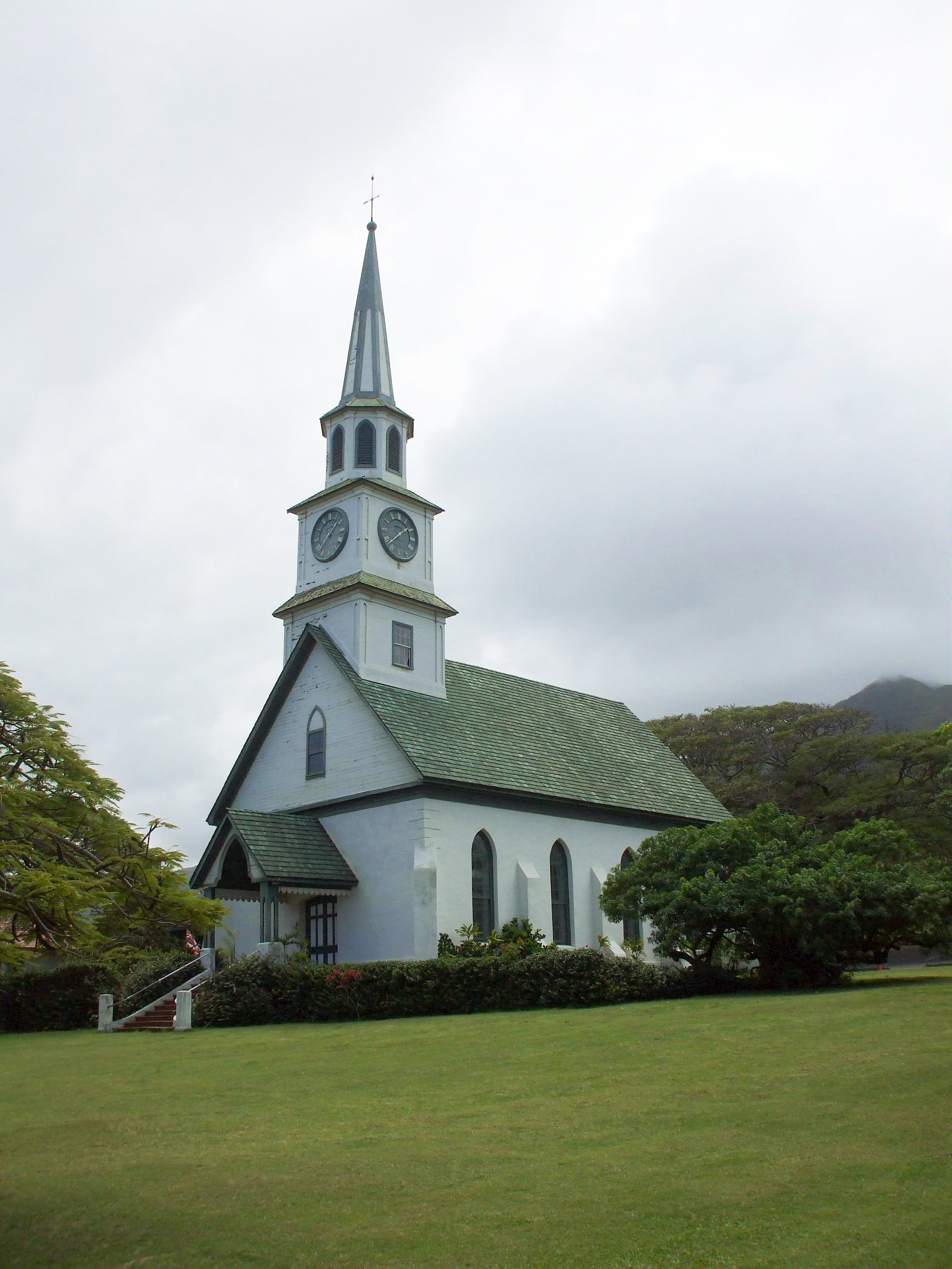 Ka'ahumanu Church.